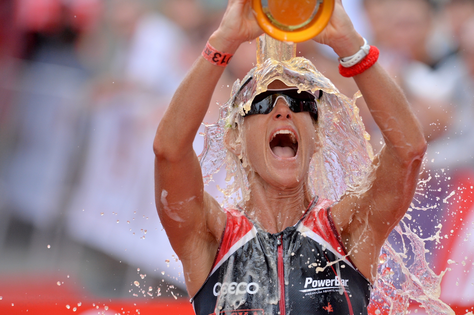 Belinda Granger Challenge Taiwan 2013